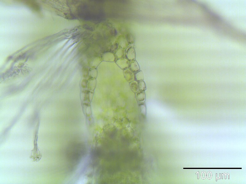 Zweizähniges Kammkelchmoos (Lophocolea bidentata), zweilappiges Unterbaltt, etwa 400x vergrößert